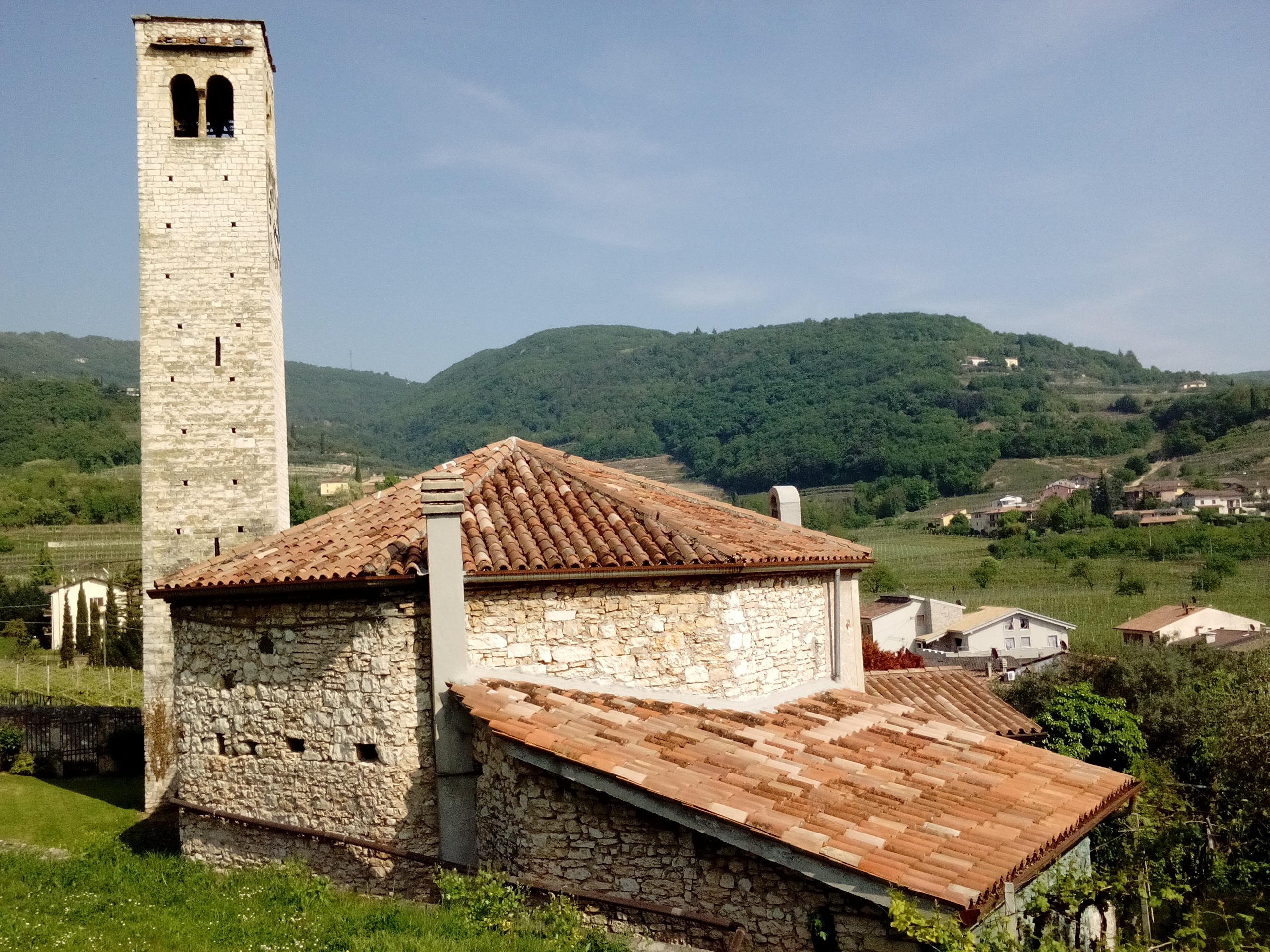 Chiesetta del XIII secolo a san Peretto, Negrar, provincia di Verona.